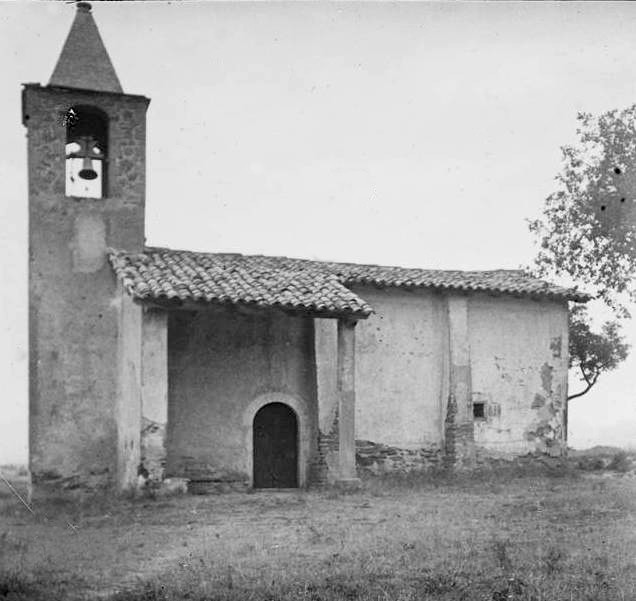 Capella de Sant Francesc s'hi Moria. Josep Salvany i Blanch (1916)